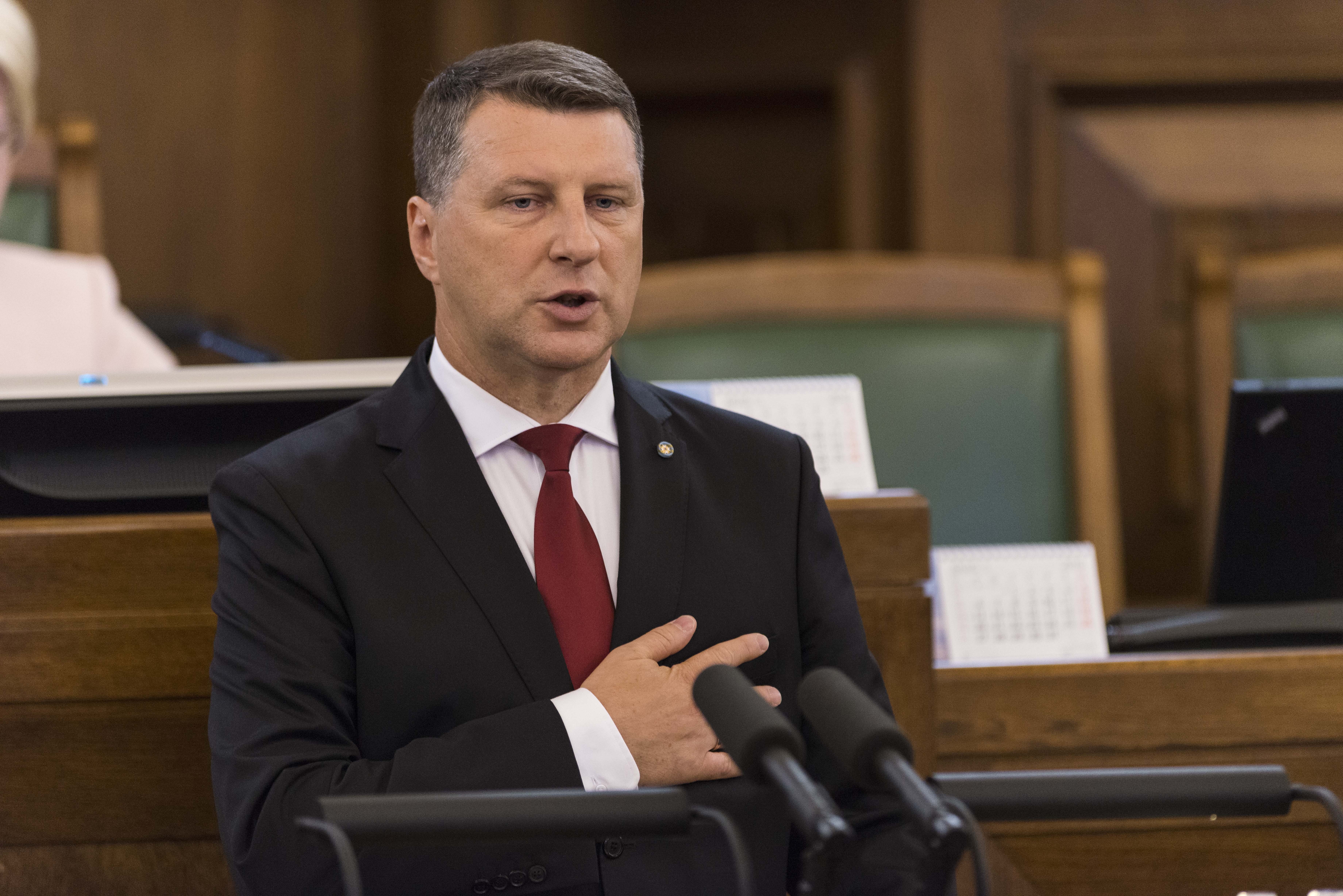 2015.gada 8.jūlijs. Raimonds Vējonis dod Valsts prezidenta svinīgo solījumu. Foto: Reinis Inkēns, Saeimas Kanceleja Izmantošanas noteikumi: saeima.lv/lv/autortiesibas